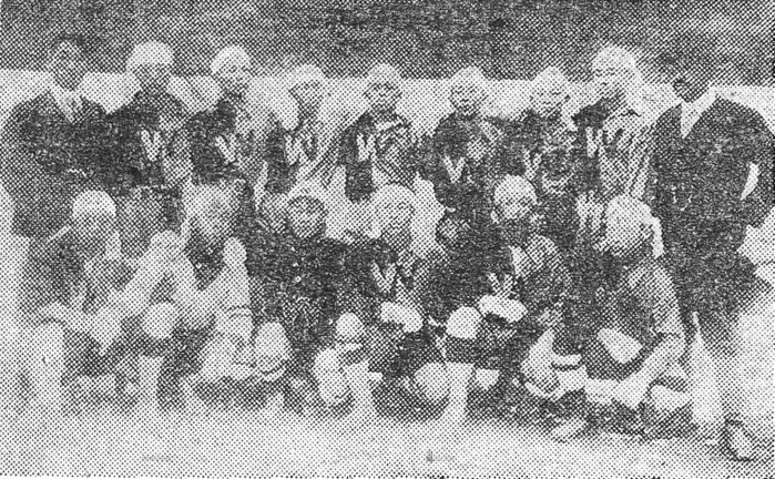 1922년 전국체육대회 축구(제3회 전조선축구대회) 중학부에서 우승한 휘문고등보통학교 선수단의 모습.